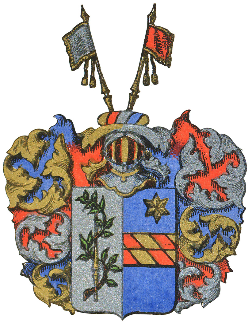 Släkten Freidenfelts Släktvapenssköld.